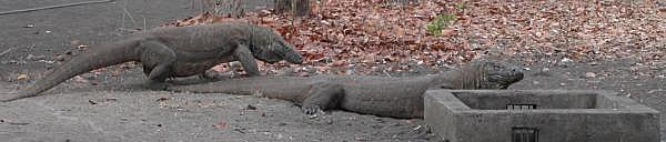 pt: Dragão de Comôdo De: [1] en: Two komodo dragons at the komodo ranger station. From :[2]